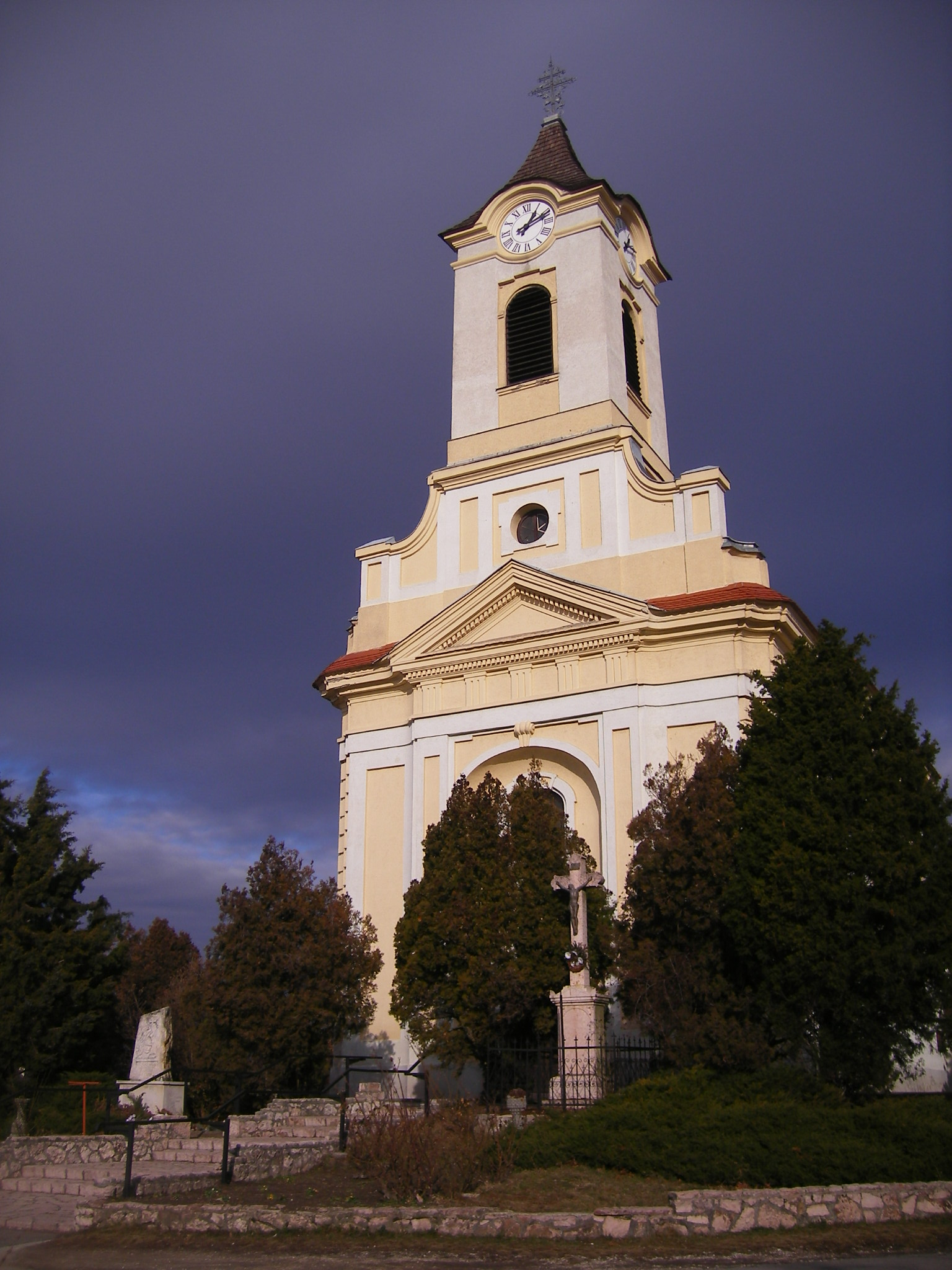 Baj - katolikus templom